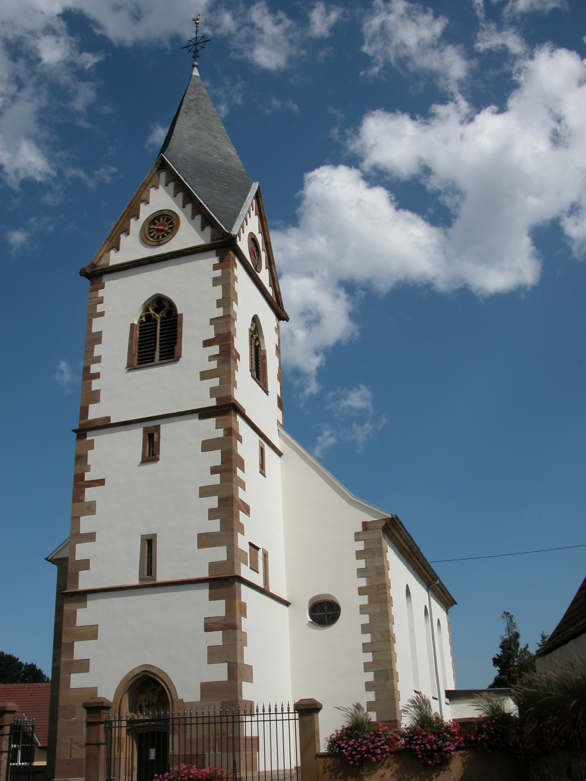 Église catholique Saint-Martin de Gresswiller